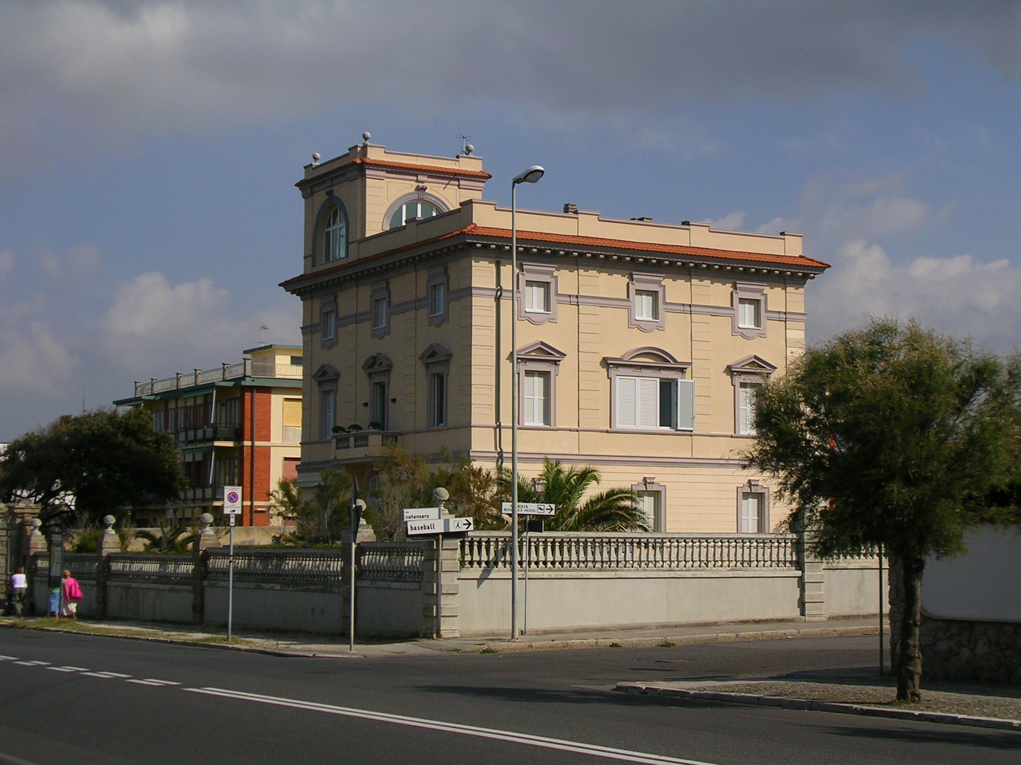 Livorno: Villa Barsanti (chiamata anche Villa Menicanti) sul lungomare nel quartiere di Antignano.